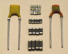 MLCC und Scheiben-Keramikkondensatoren